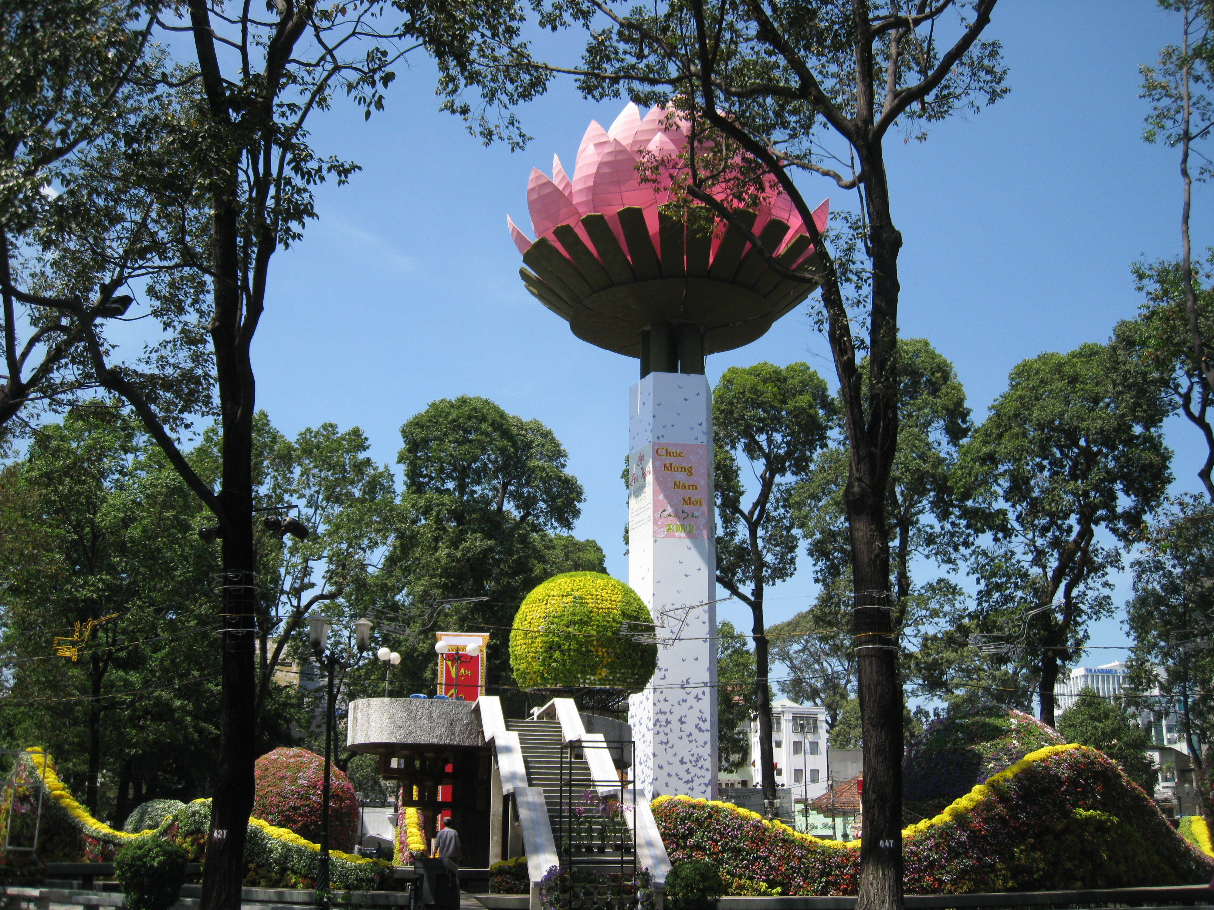 Hồ Con Rùa Tết 2010.